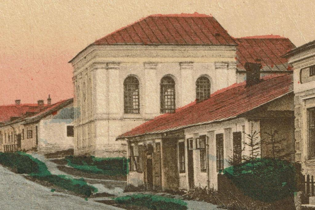 Синагога в Сасові на вулиці Божничій на старій поштівці.